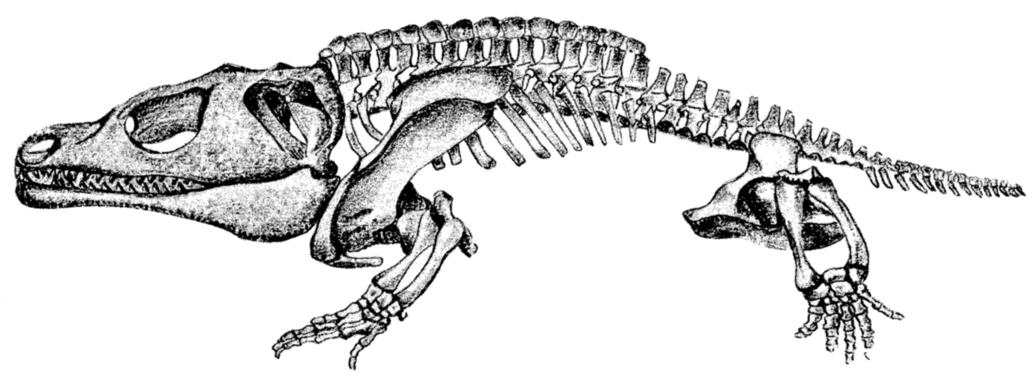 Cacops skeleton.